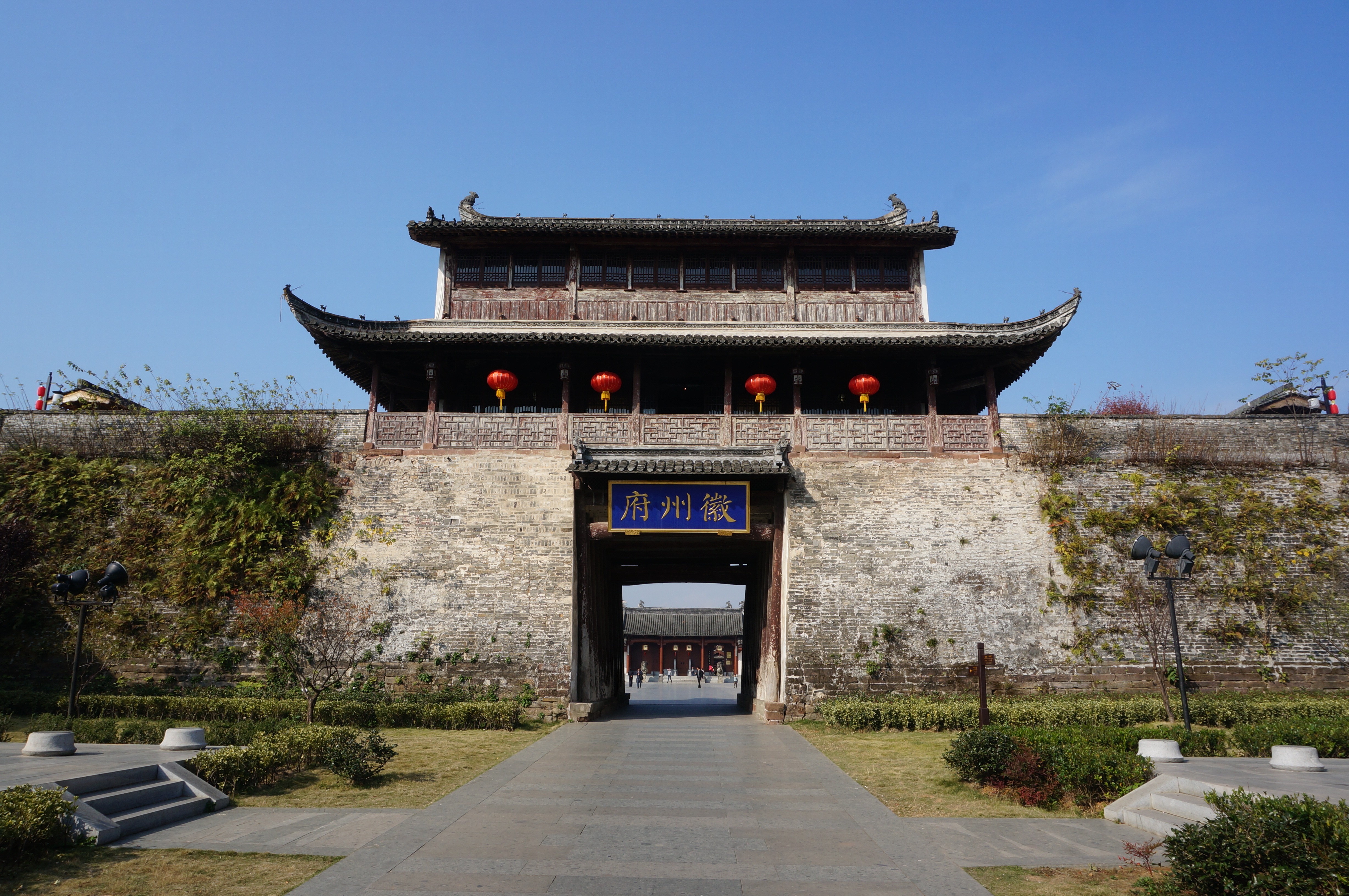 徽州府衙，南谯楼。